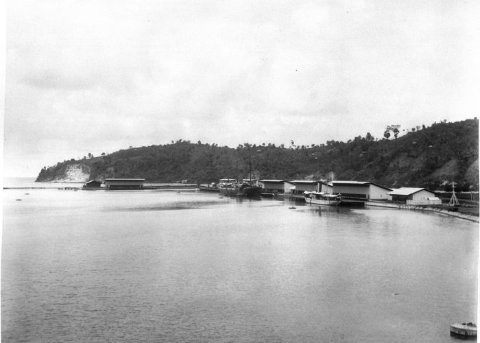 Foto. De Emmahaven in Padang, Sumatra`s Westkust